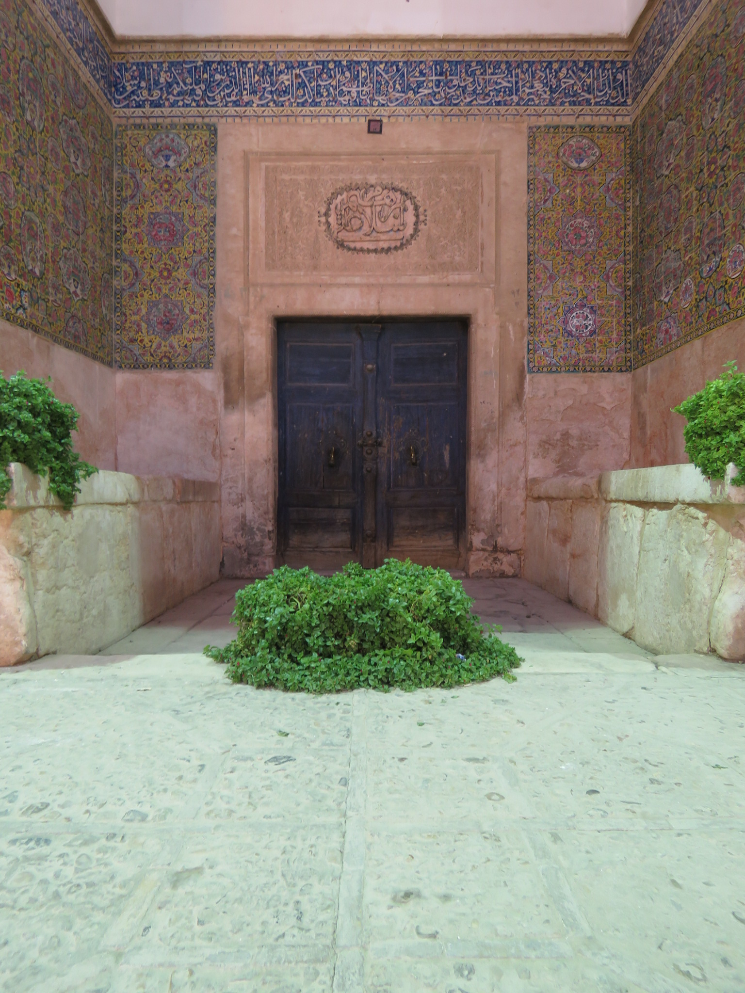 مدرسه ابراهیمی